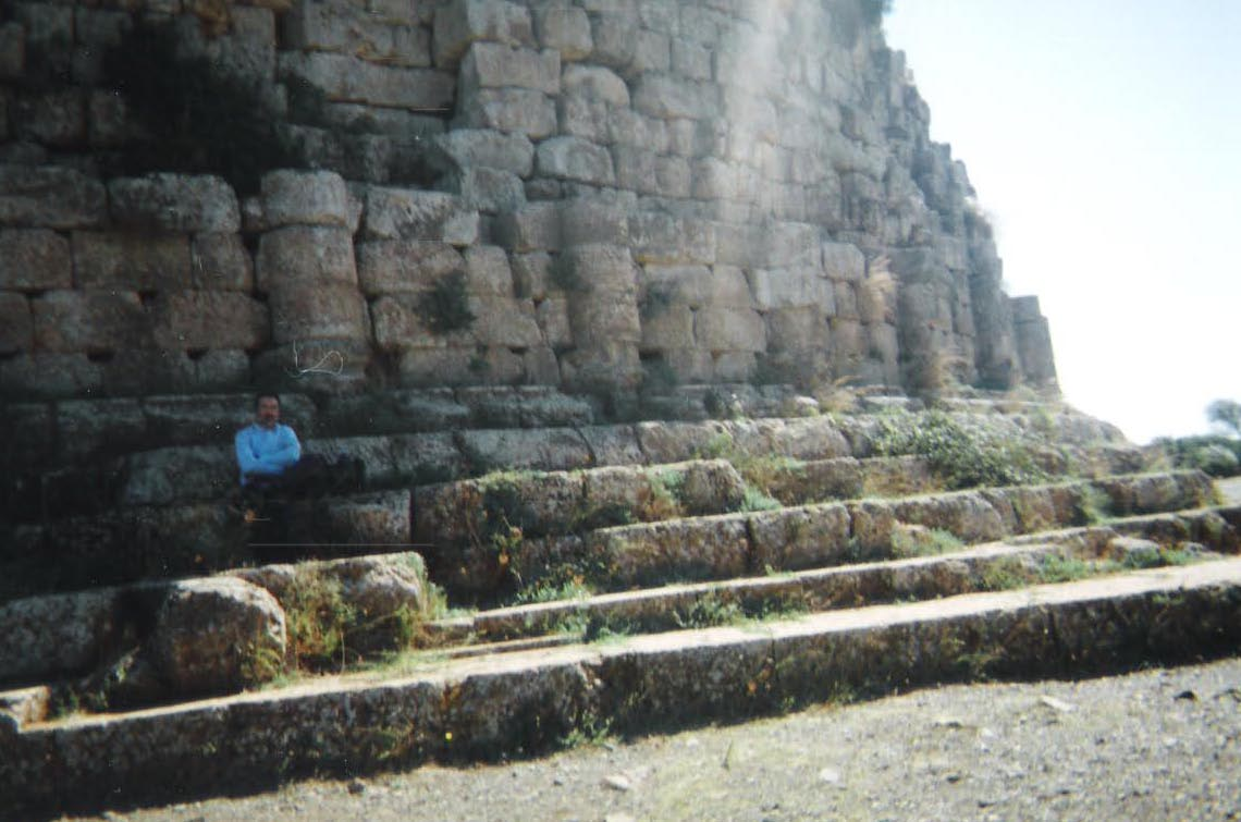 Base du Mausolée Royal de Maurétanie à Tipaza